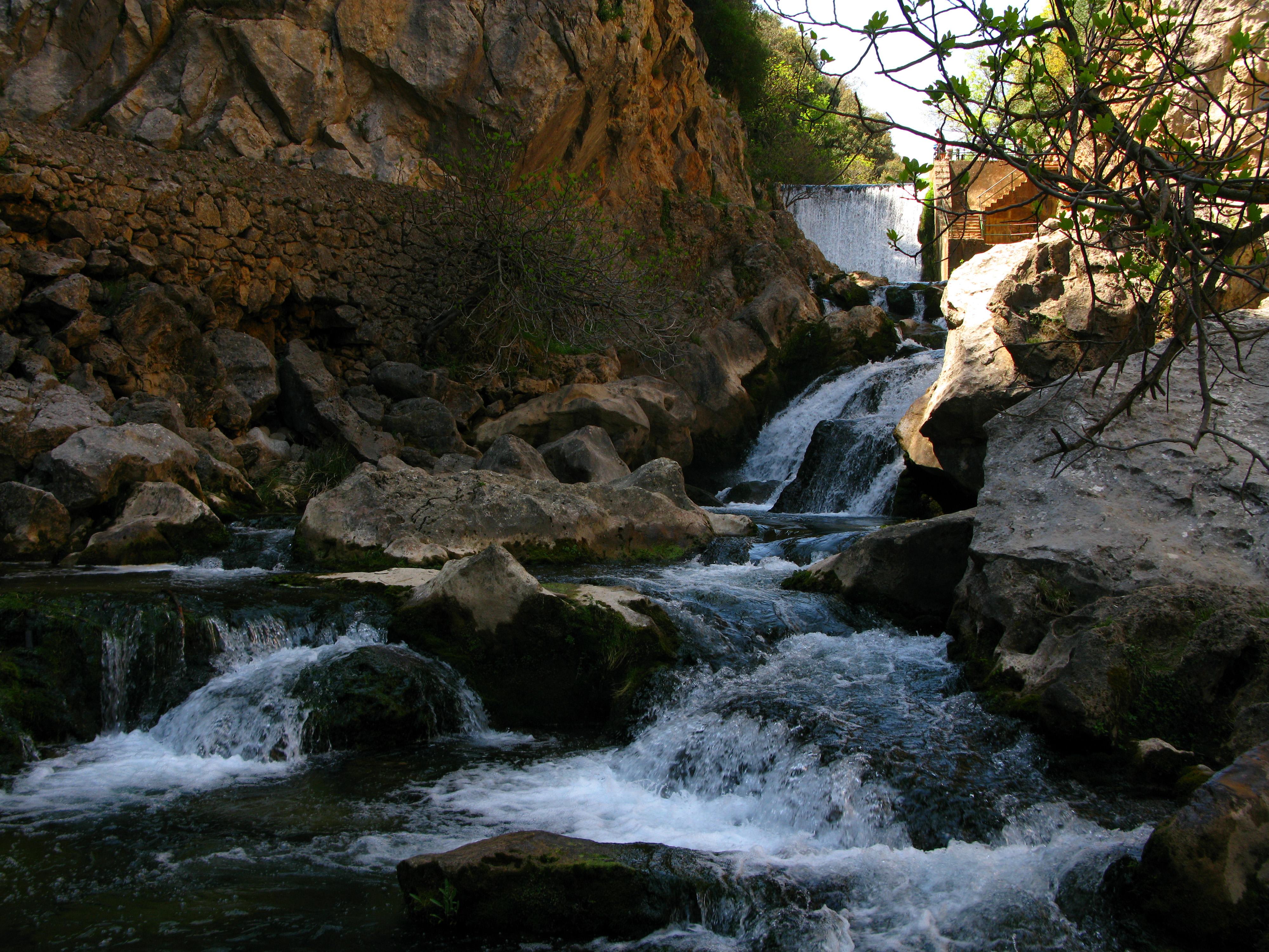 Parque Natural Sierra de Cazorla: Curso alto del río Guadalquivir a su paso por Cerrada del Utrero This is a photography of a Special Area of Conservation in Spain with the ID: ES0000035. Natura2000 entry, EEA entry